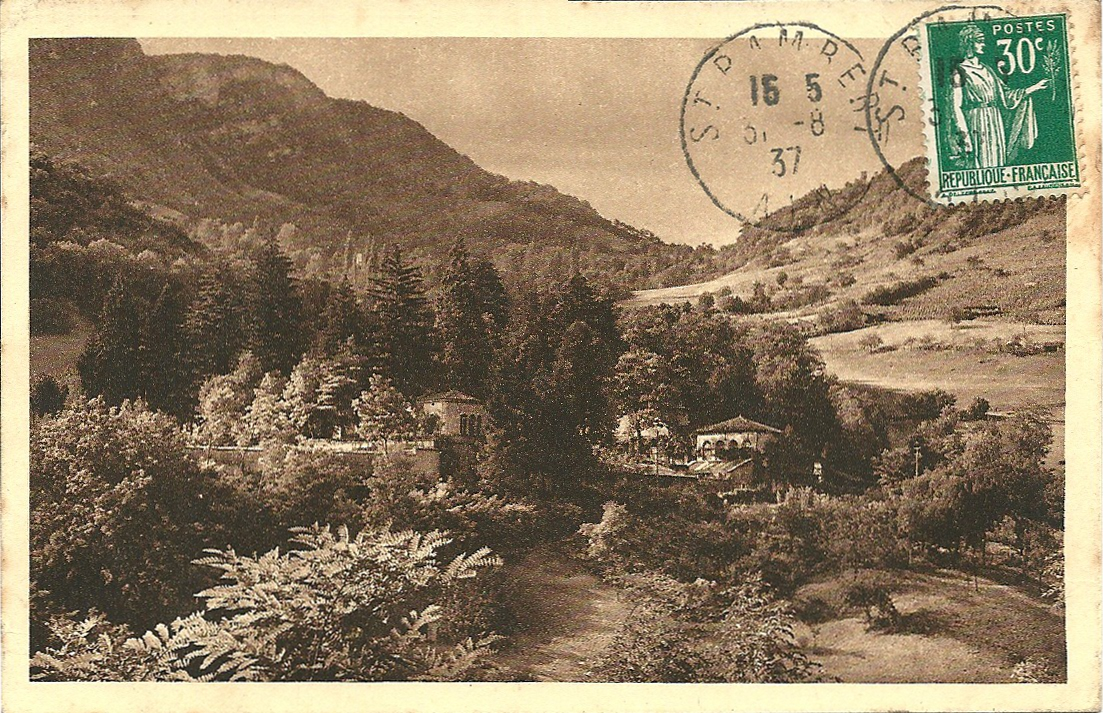 Saint-Rambert-en-Bugey - L'Abbaye - avant 1937 (date d'envoi postal de la carte)